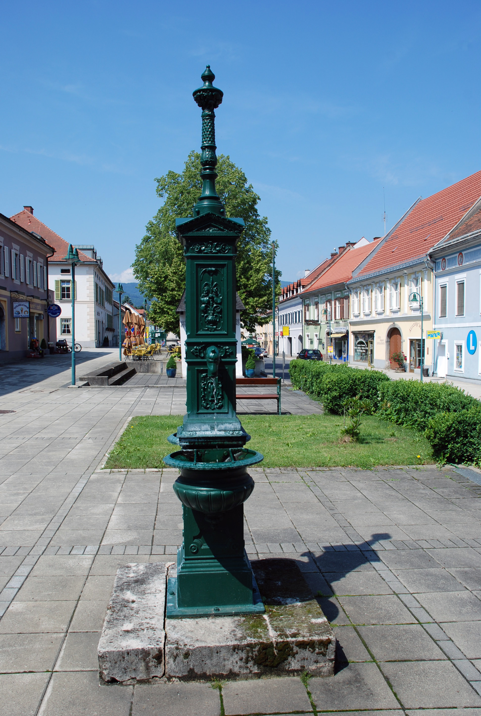 Eibiswald, Steiermark, Österreich: Marktbrunnen